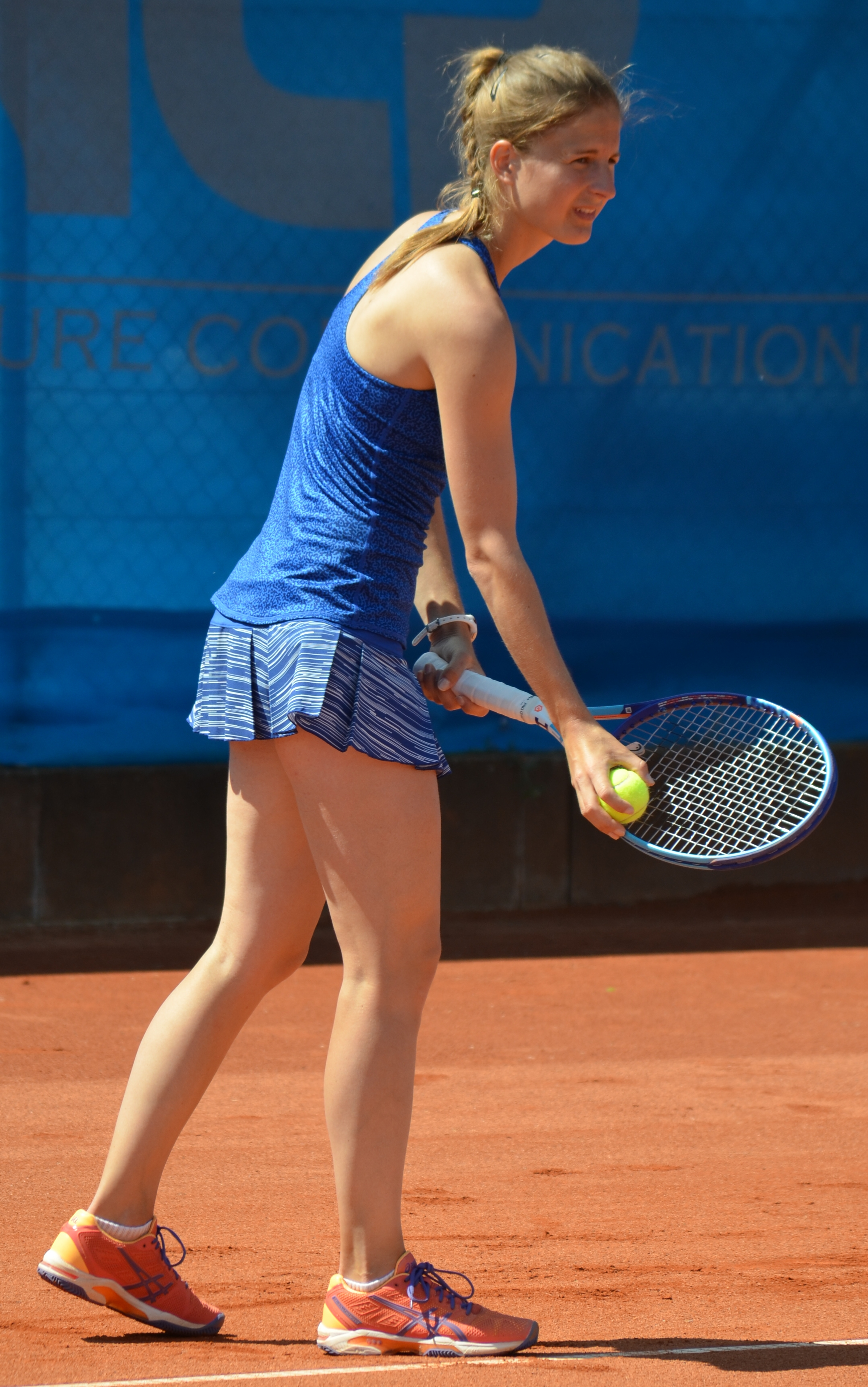 Kateřina Vaňková in der Qualifikationsbegegnung des Nürnberger Versicherungscup 2015 gegen Alison Van Uytvanck am 16.05.2015